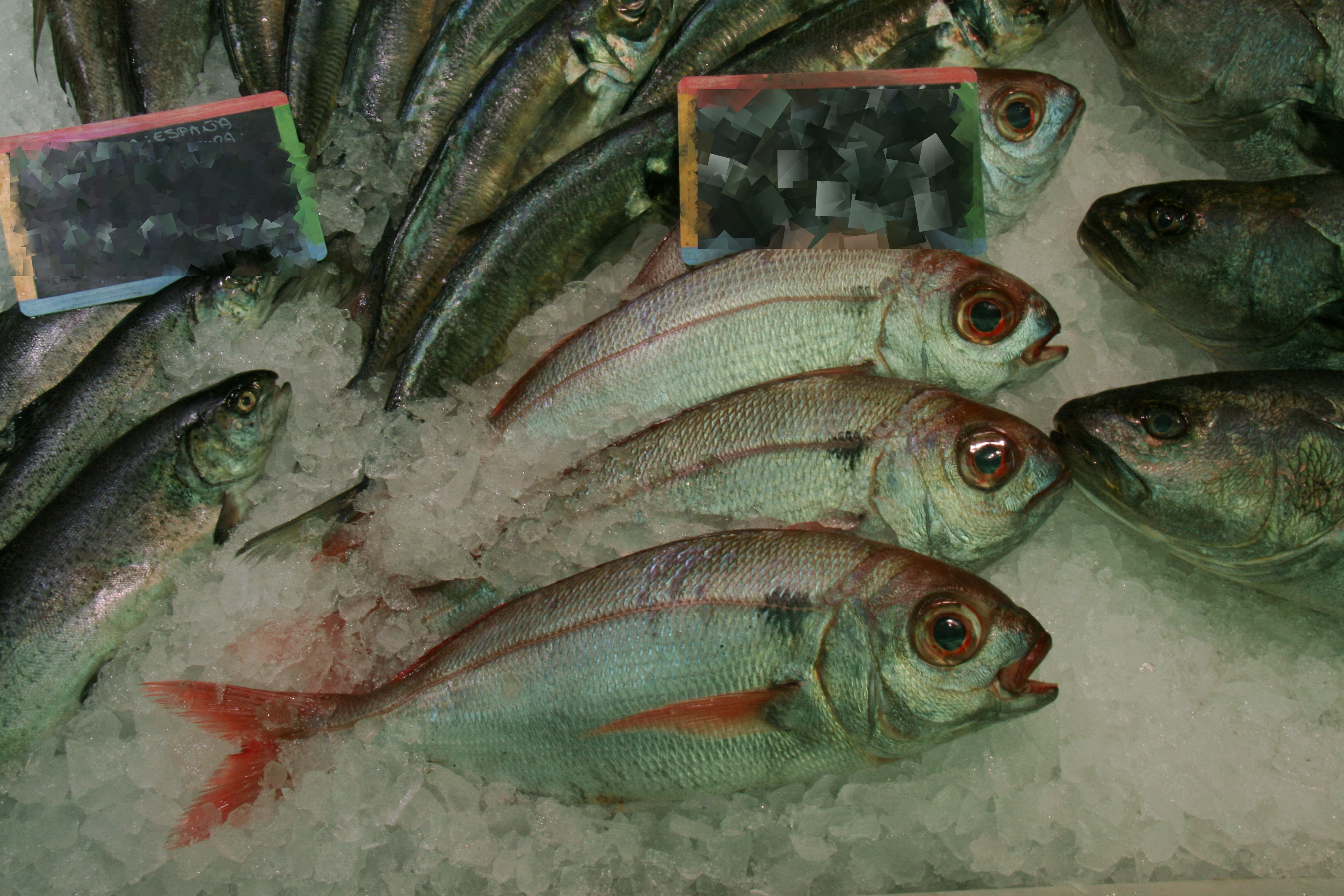 Besugo de Tarifa (Mercado de Madrid)